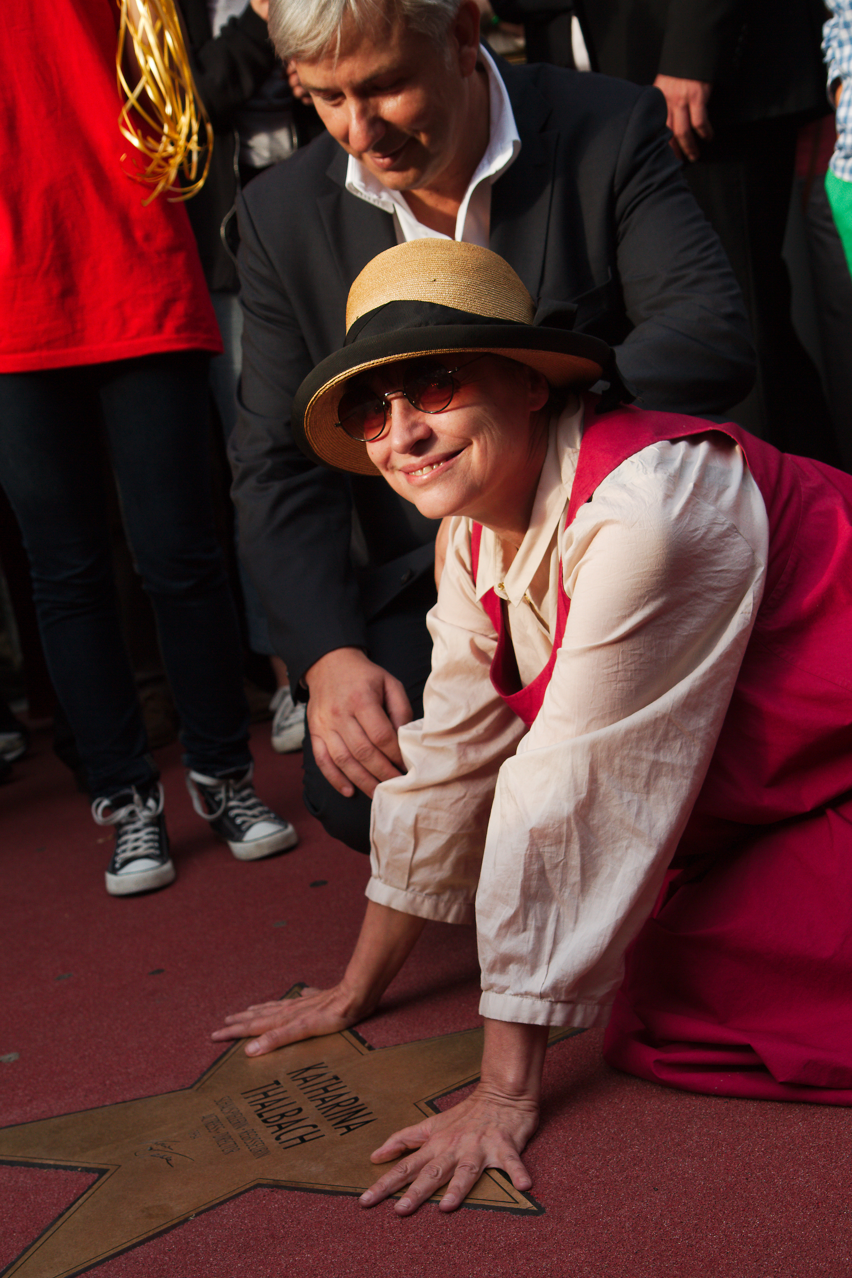 Dahinter Klaus Wowereit